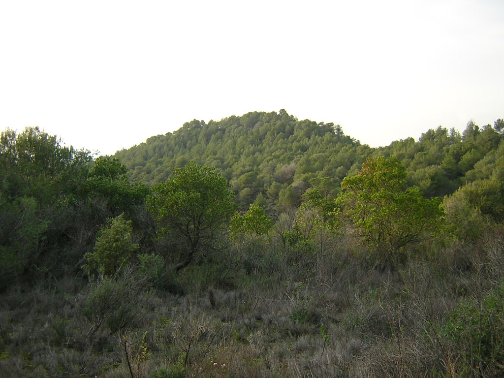 El Turó del Jep Dó (Monistrol de Calders, Moianès)